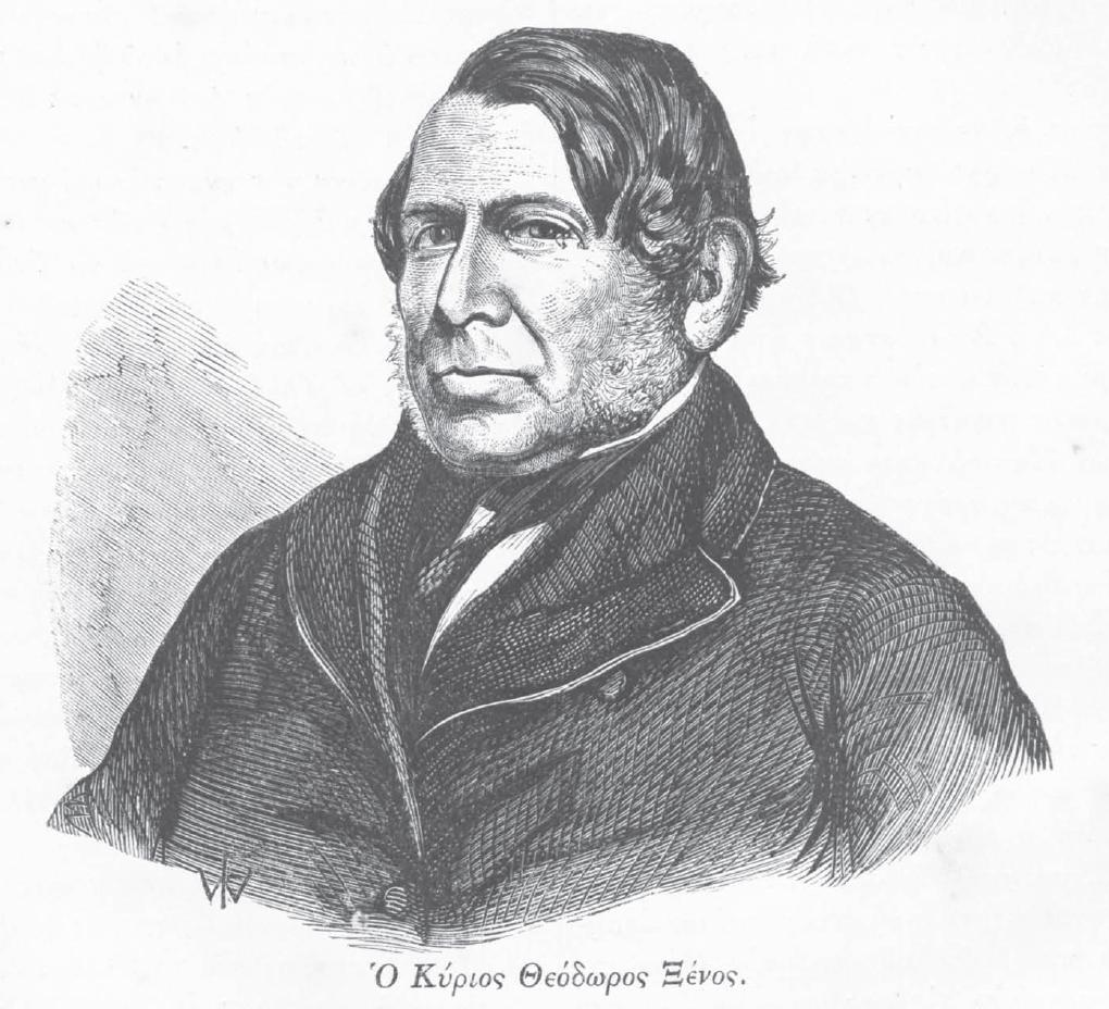 Θεόδωρος Ξένος, πατέρας του Στεφάνου Ξένου